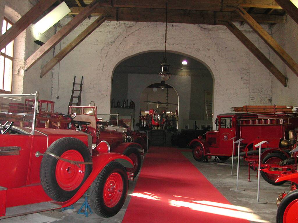 Galleria storica dei Vigili del Fuoco di Mantova, Lavoro personale, 17/02/2000, Pietro Liberati